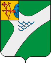 Герб Кирово-Чепецка